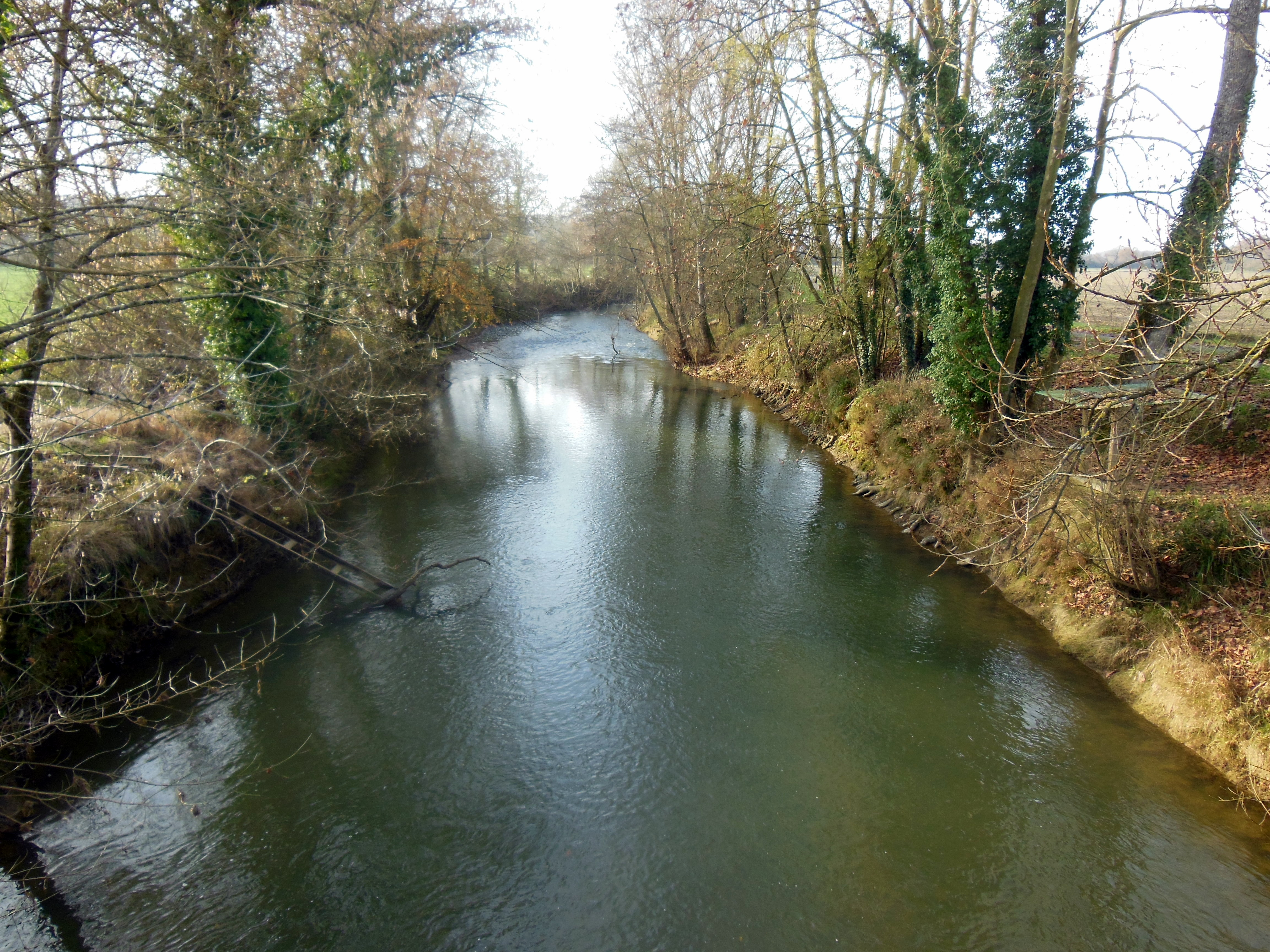 Rivière Gabas, à Banos (Landes, France)